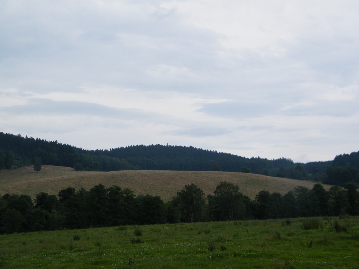 Vrch Jáchym z pohledu od lobendavského hřbitova